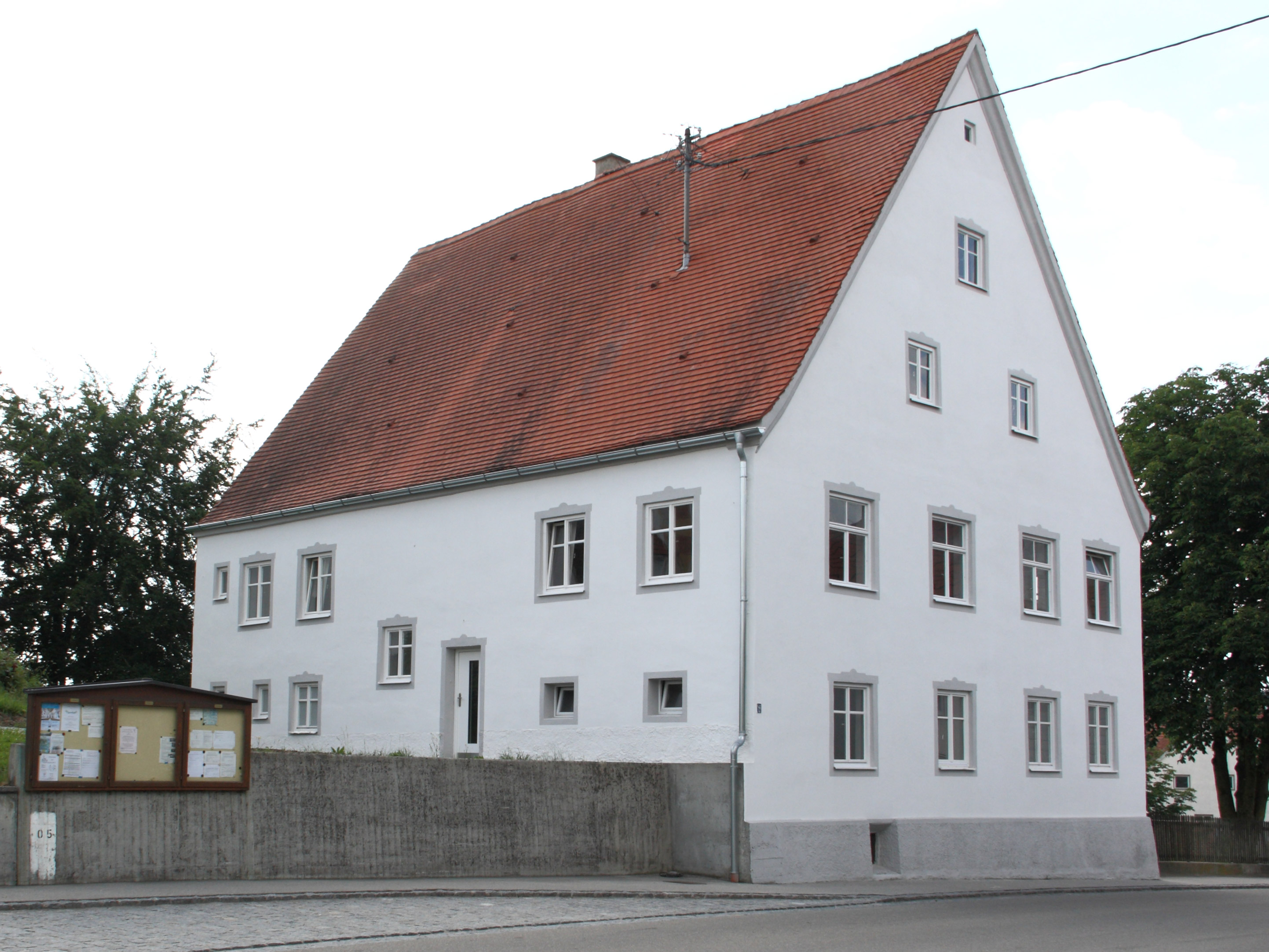 Südostansicht des ehem. Pfarrhofs